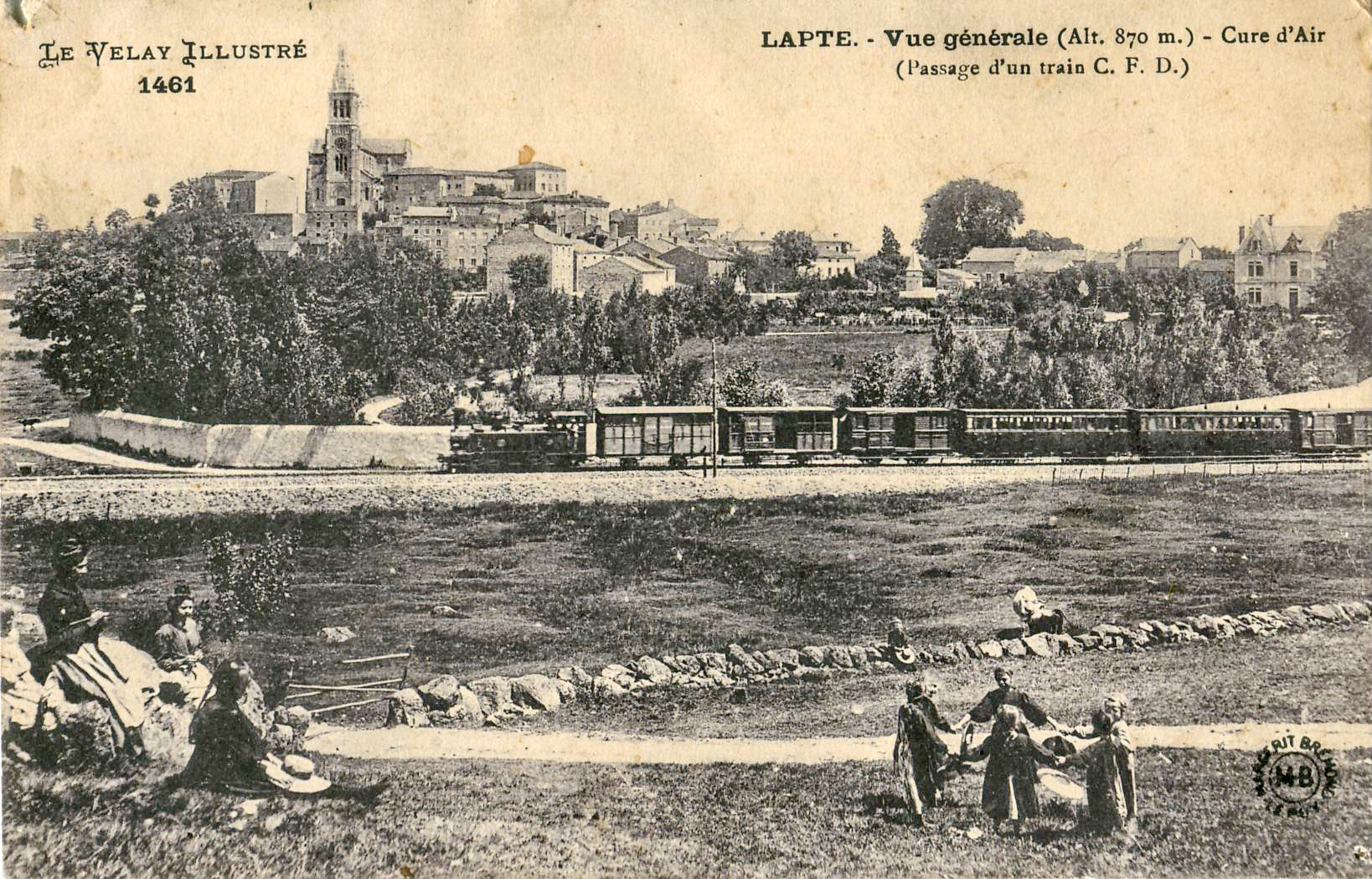 Carte postale ancienne éditée par MB, collection Le Velay Illustré, n°1461 LAPTE - Vue générale (alt. 870 m.) - Cure d'Air (Passage d'un train C. F. D.)